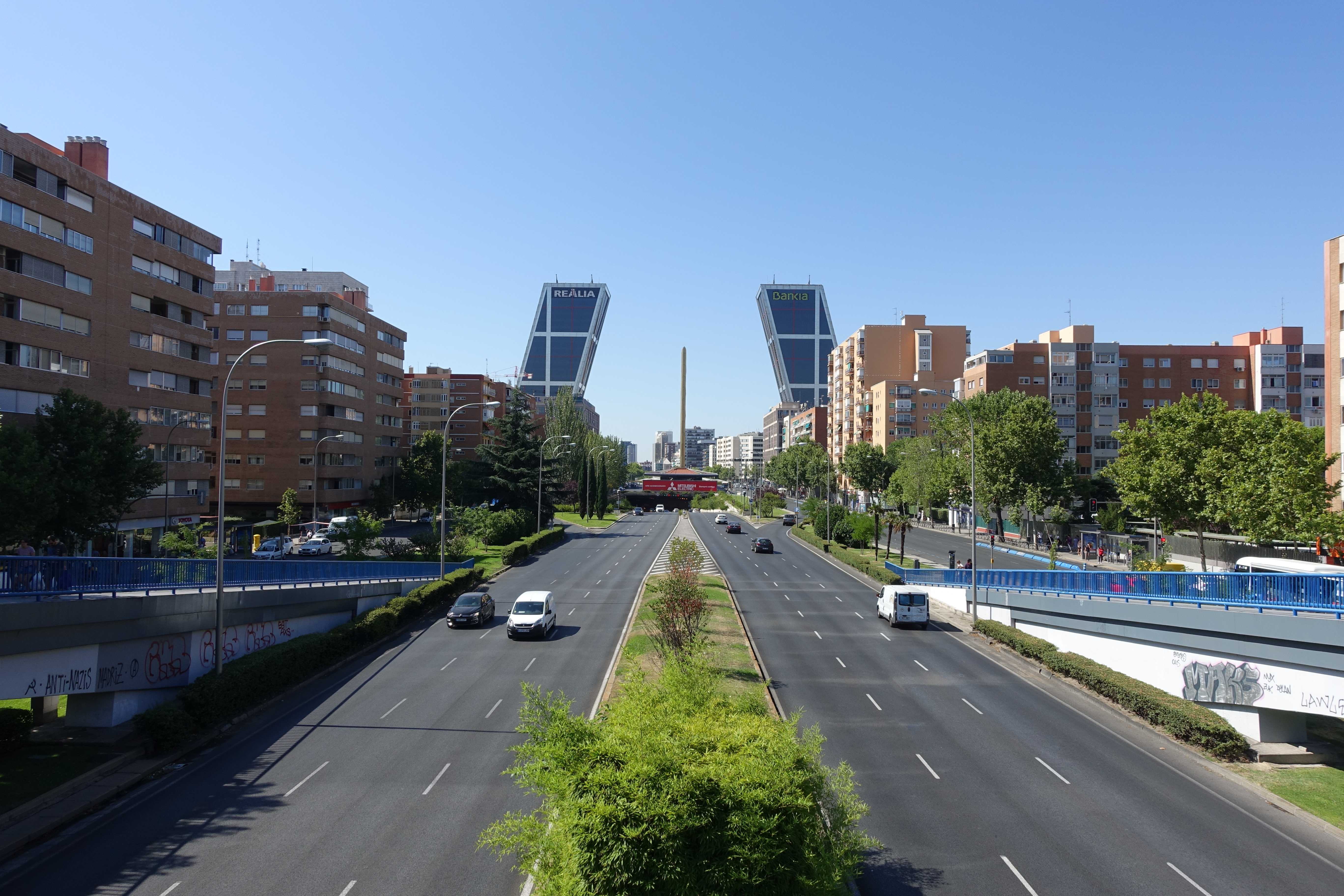 Paseo de la Castellana con torres Realia y Bankia (08/2019)